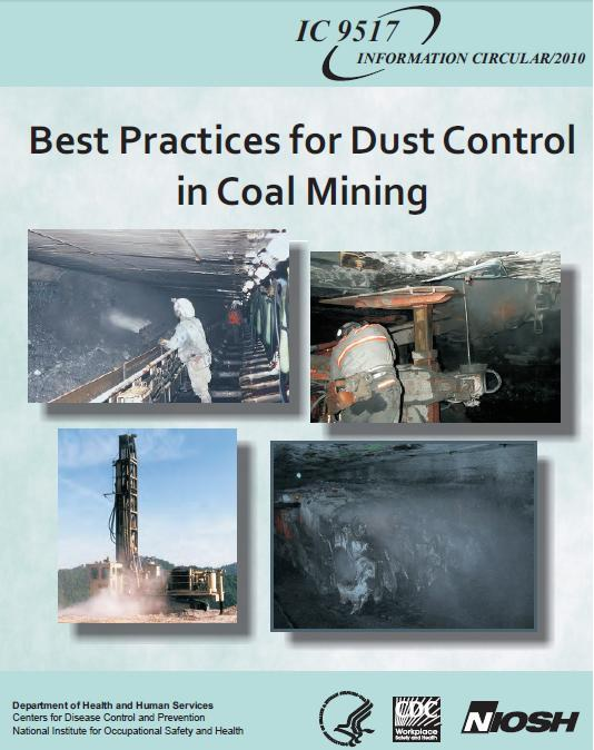 иллюстрации документа, который является общественным достоянием.